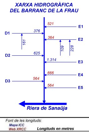 Mapa esquemàtic de la xarxa hidrogàfica del Barranc de la Frau, al Solsonès.